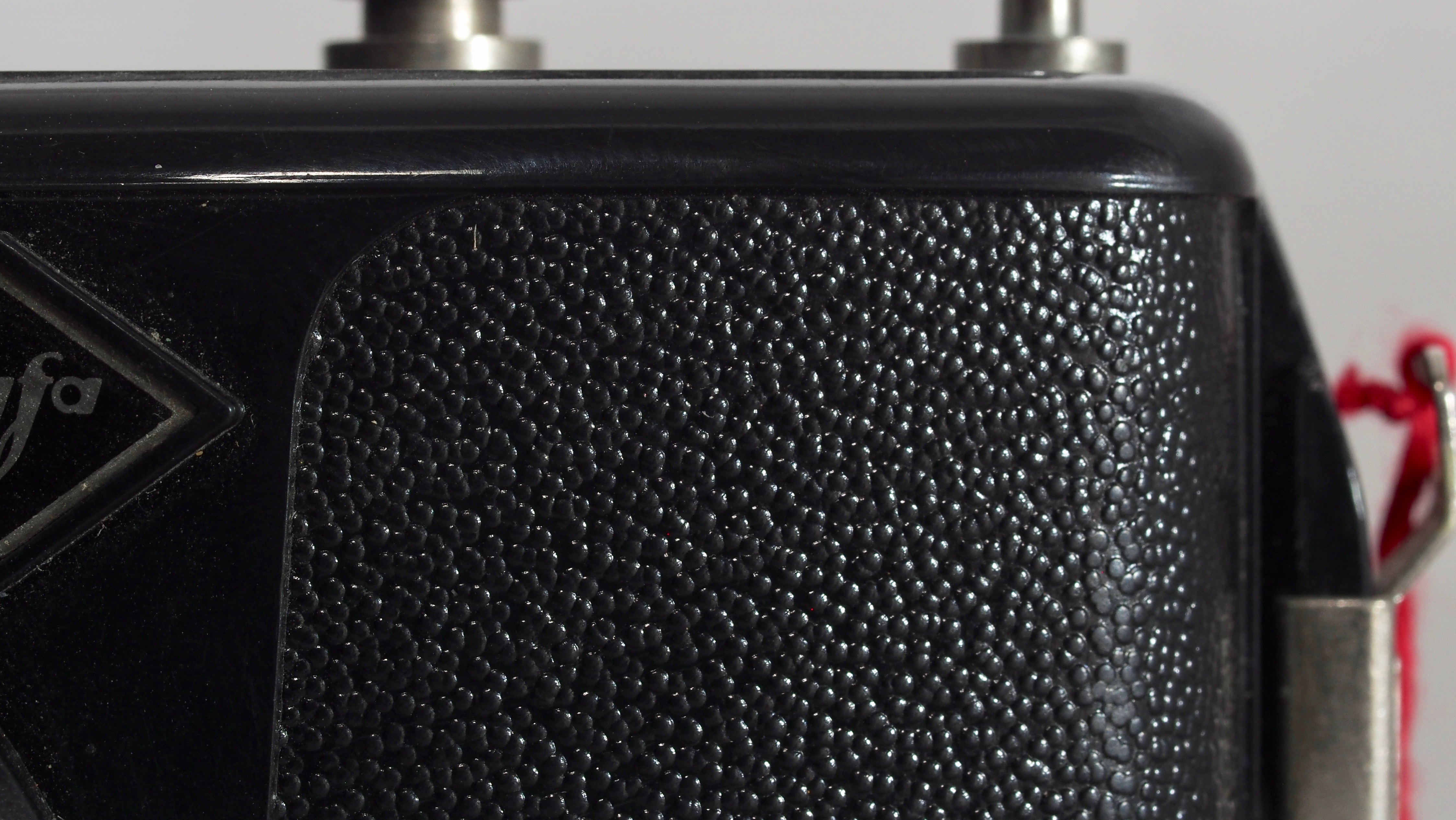 Clcik Oberfläche Leder schwarz